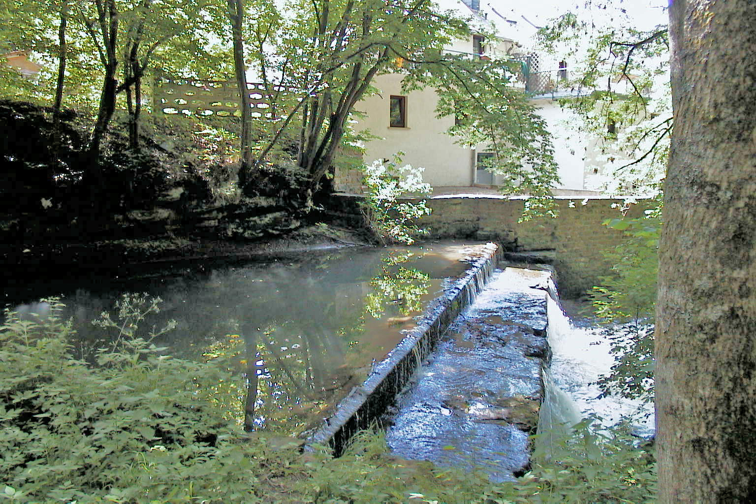 Wäiss Iernz: Wier bei der Franckemillen.